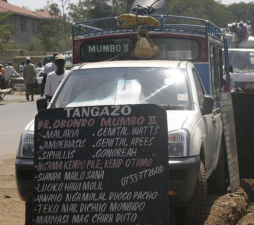 Vendeur ambulant de médicament